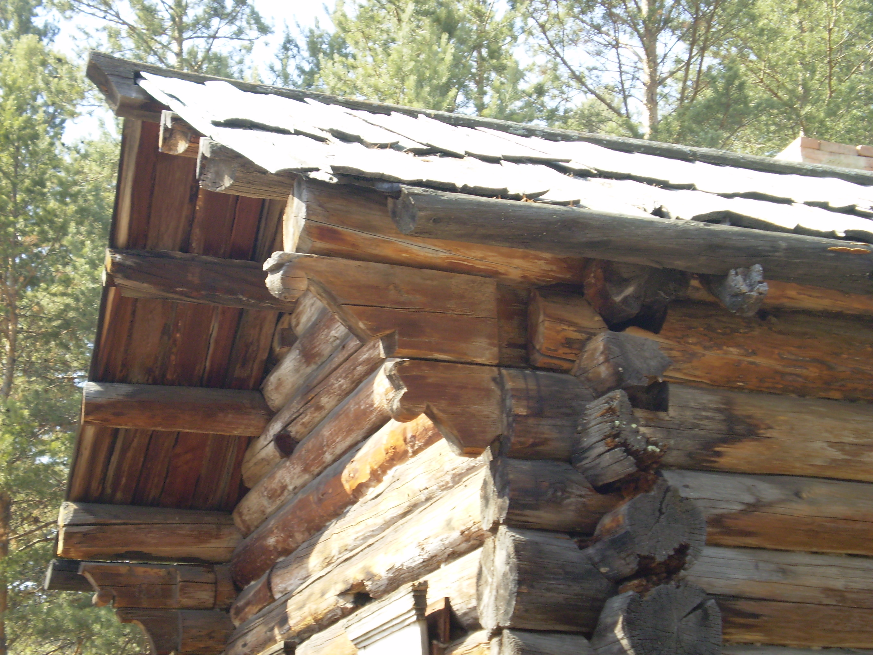 Кровля крестьянского дома